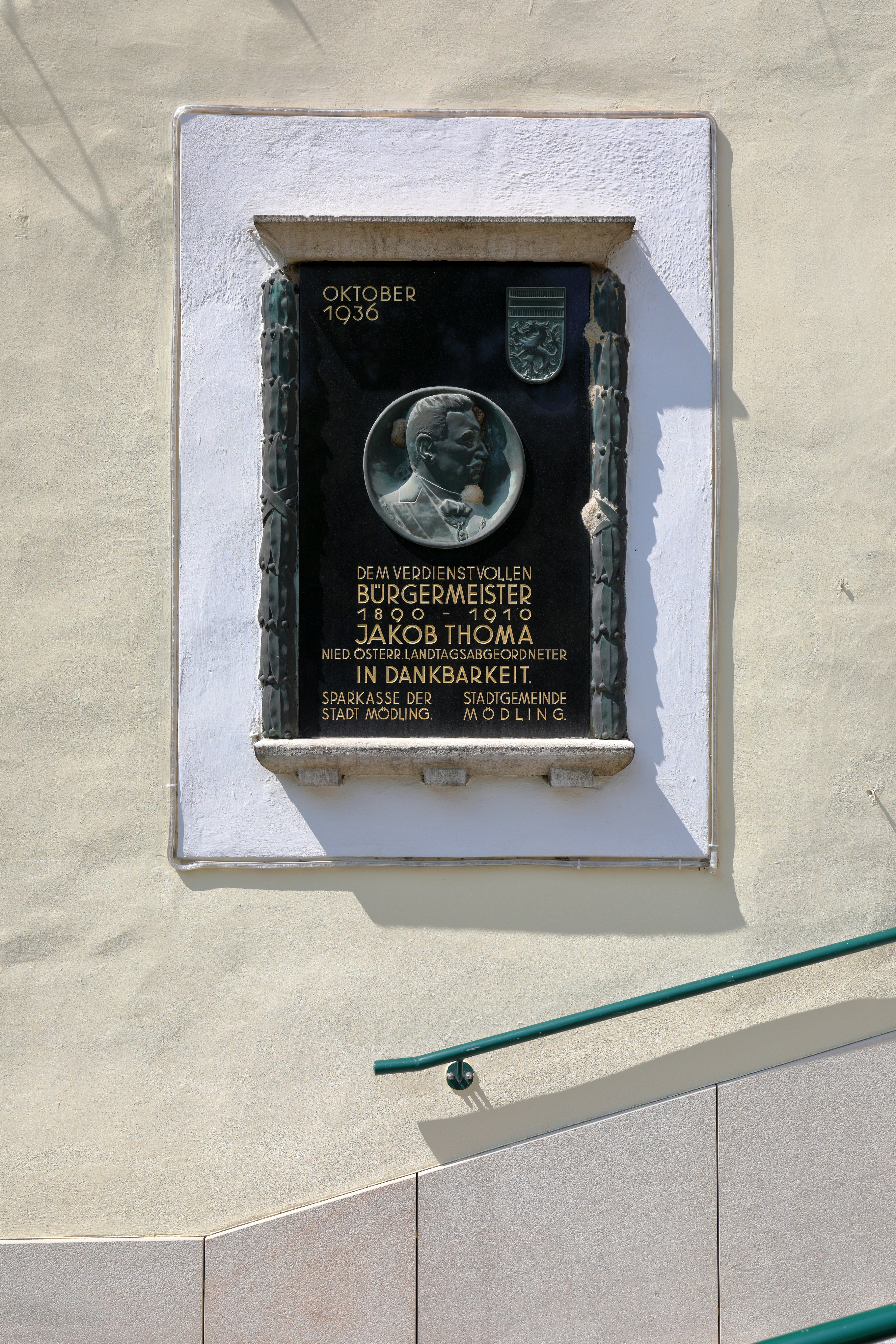 Die Gedenktafel am alten Rathaus in der niederösterreichischen Bezirkshauptstadt Mödling erinnert an den Bürgermeister Jakob Thoma (* 2. Dezember 1848 in Mödling; † 22. Oktober 1910 ebenda). Er war von 1890 bis 1910 Mödlinger Bürgermeister und Abgeordneter des Niederösterreichischen Landtages.